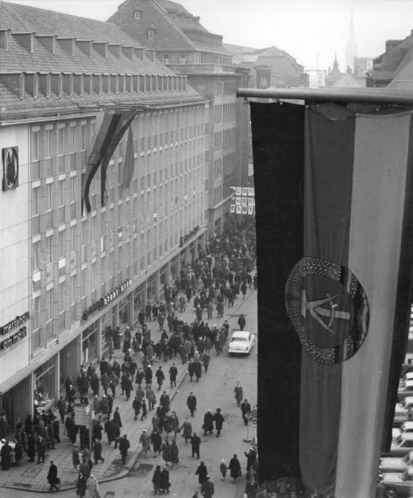 Leipzig, Petersstraße, Messehaus am Markt Zentralbild Sturm th-ki 2.3.1965 Leipziger Jubiläumsmesse 1965 Blick zur Petersstraße. Links das Messehaus am Markt.